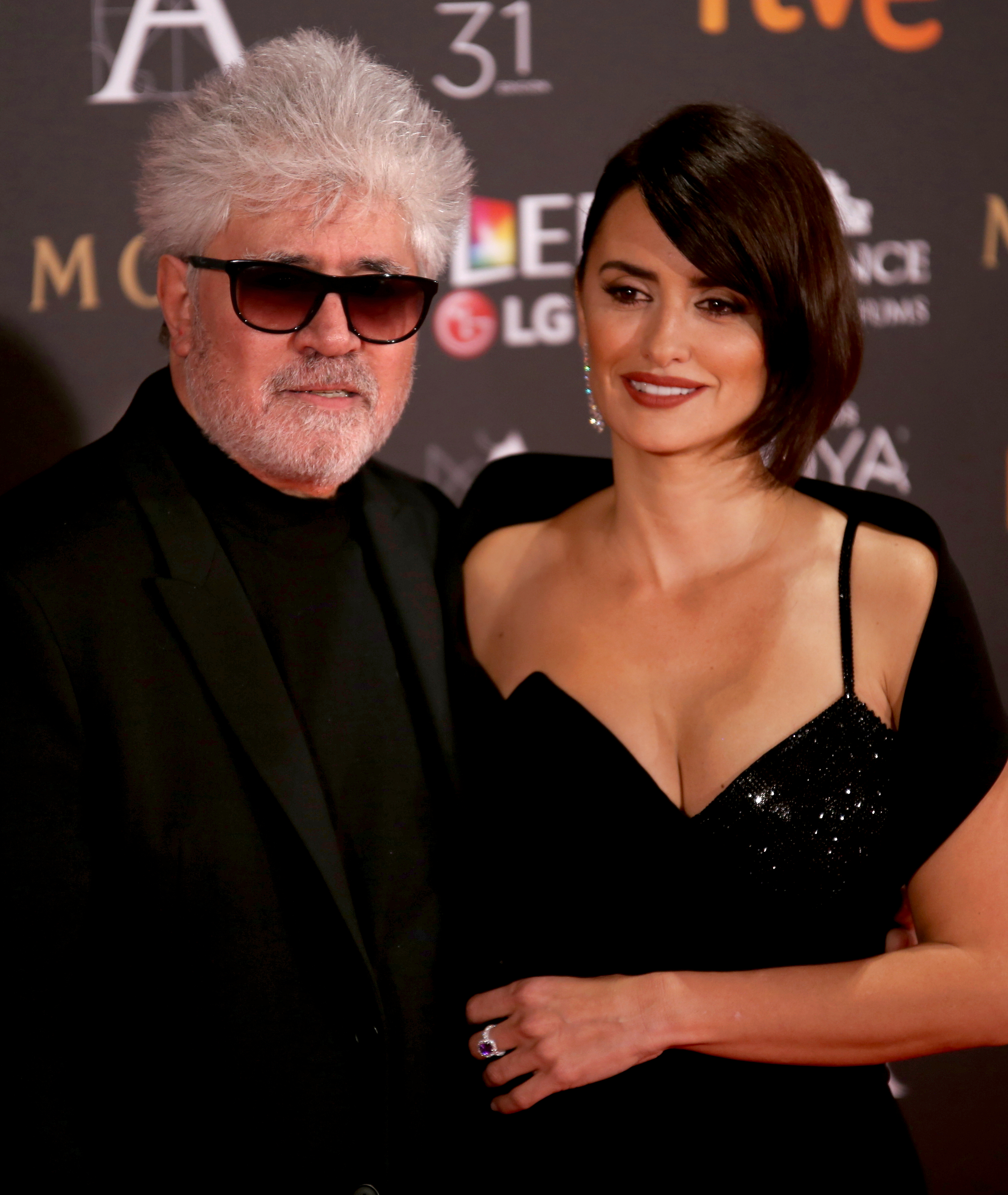 Premios Goya 2017